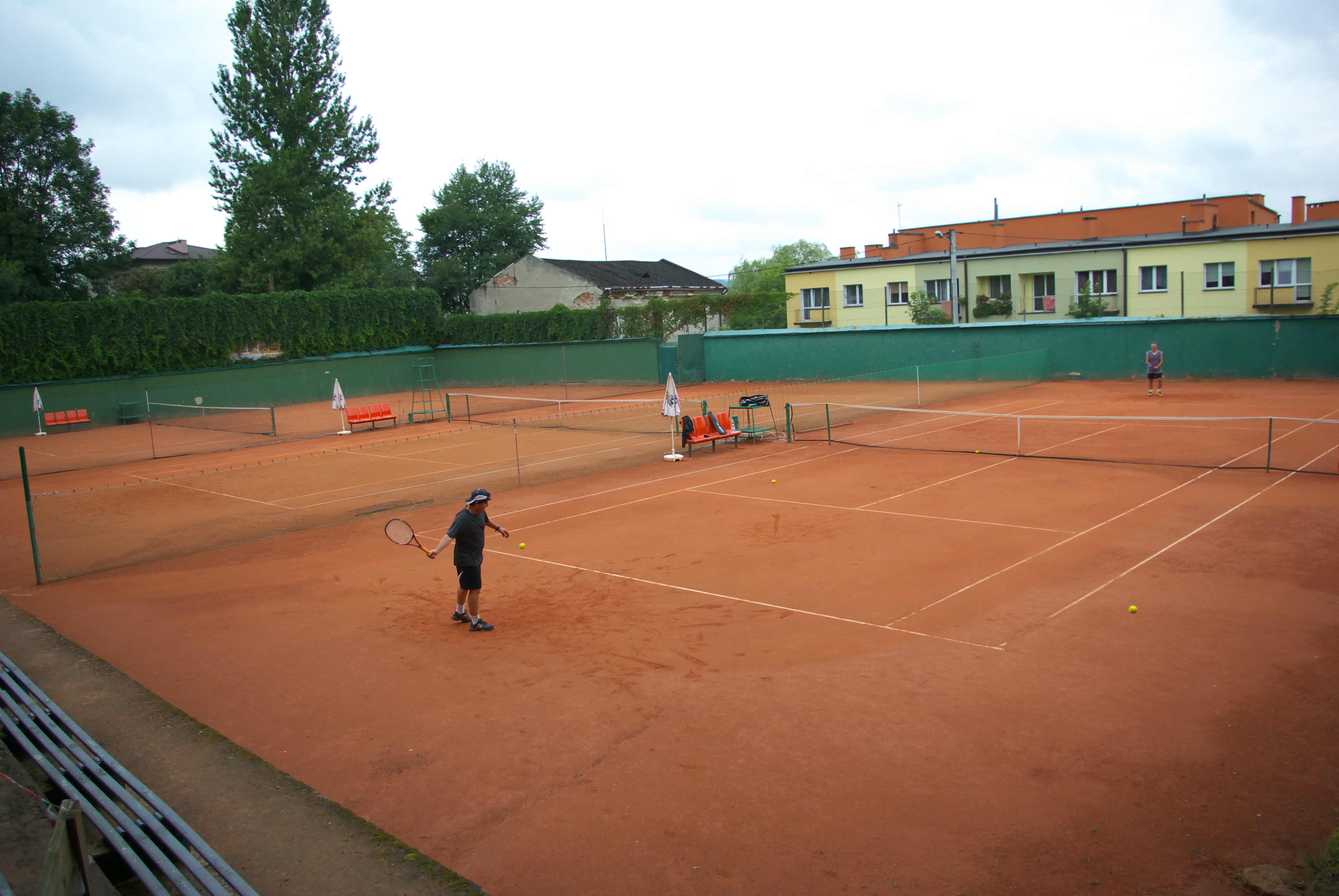 Kort tenisowy przy ul. Mickiewicza w Sanoku